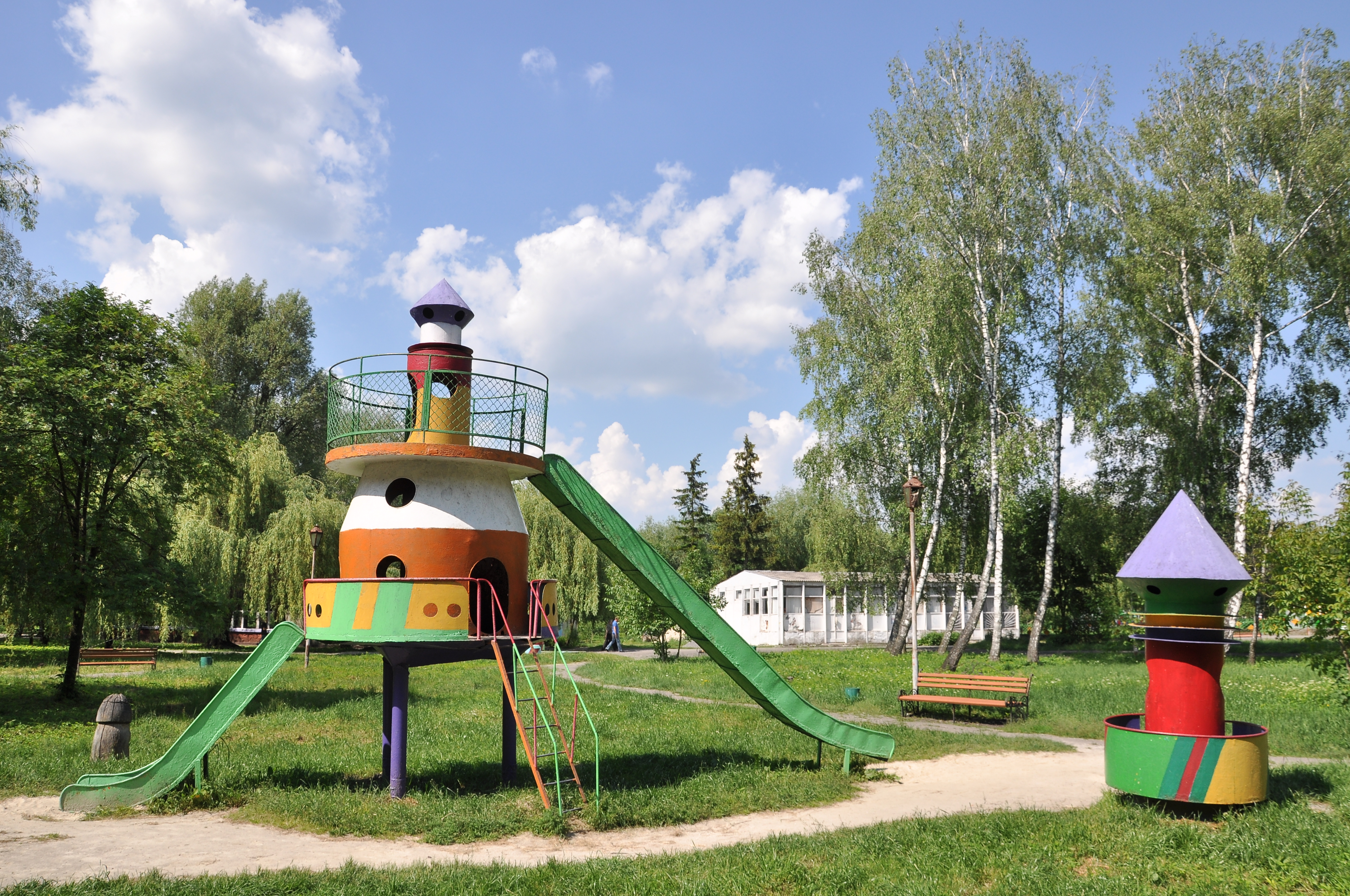 Космічне містечко в тернопільському гідропарку «Топільче».